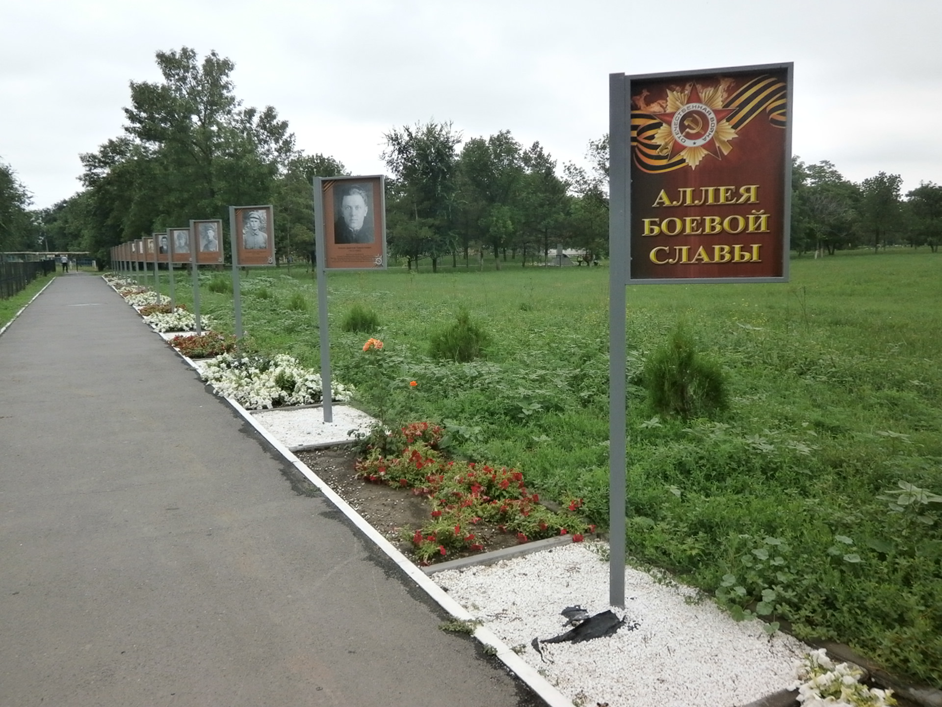 Аллея боевой славы в посёлке Весёлый Ростовской области